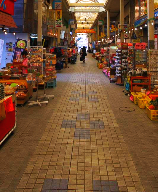 Market at Ishigaki island, Okinawa, Japan.